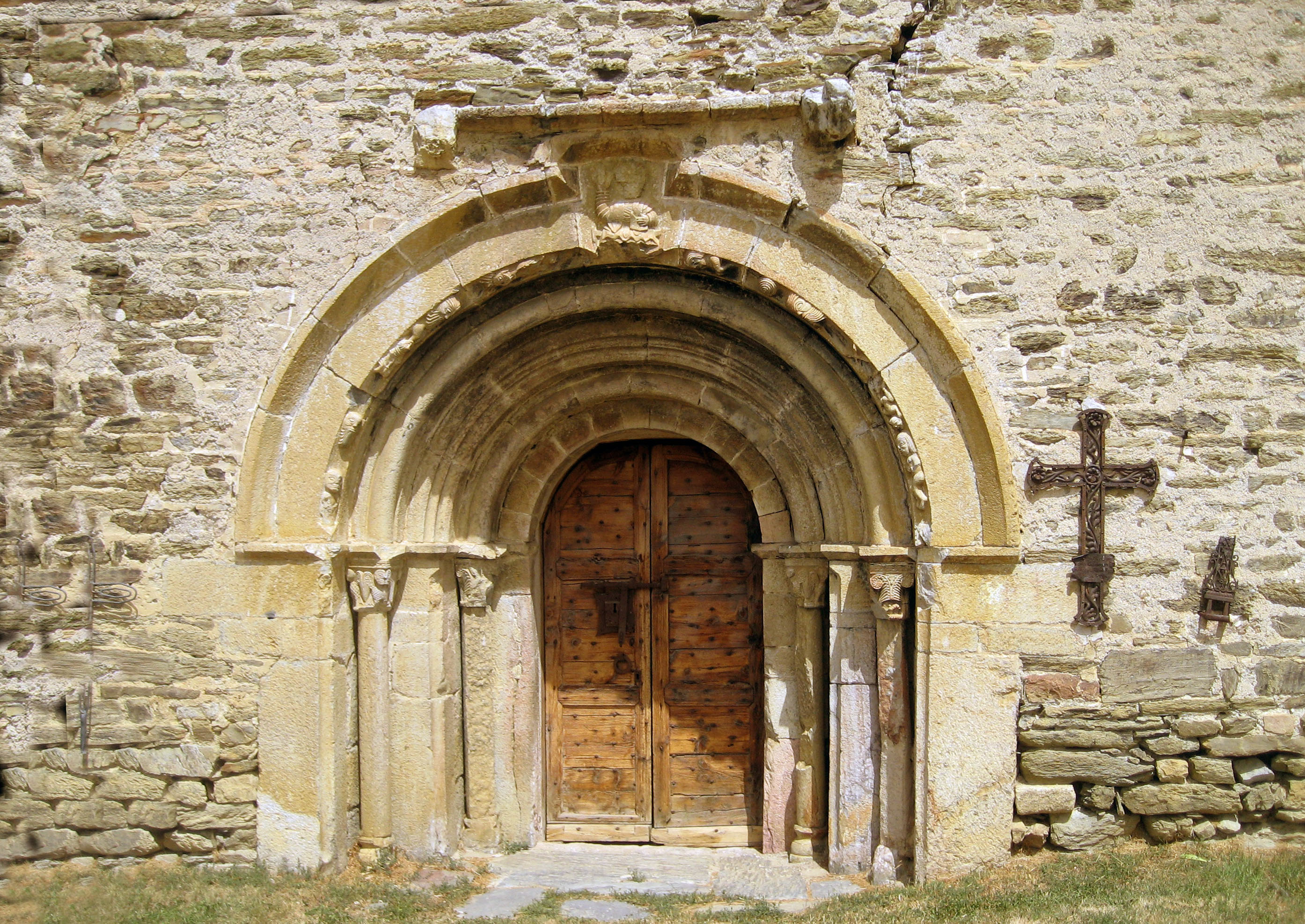 Portada de la iglesia románica de Santa Eugenia de Saga en la Cerdanya Baixa. Cataluña